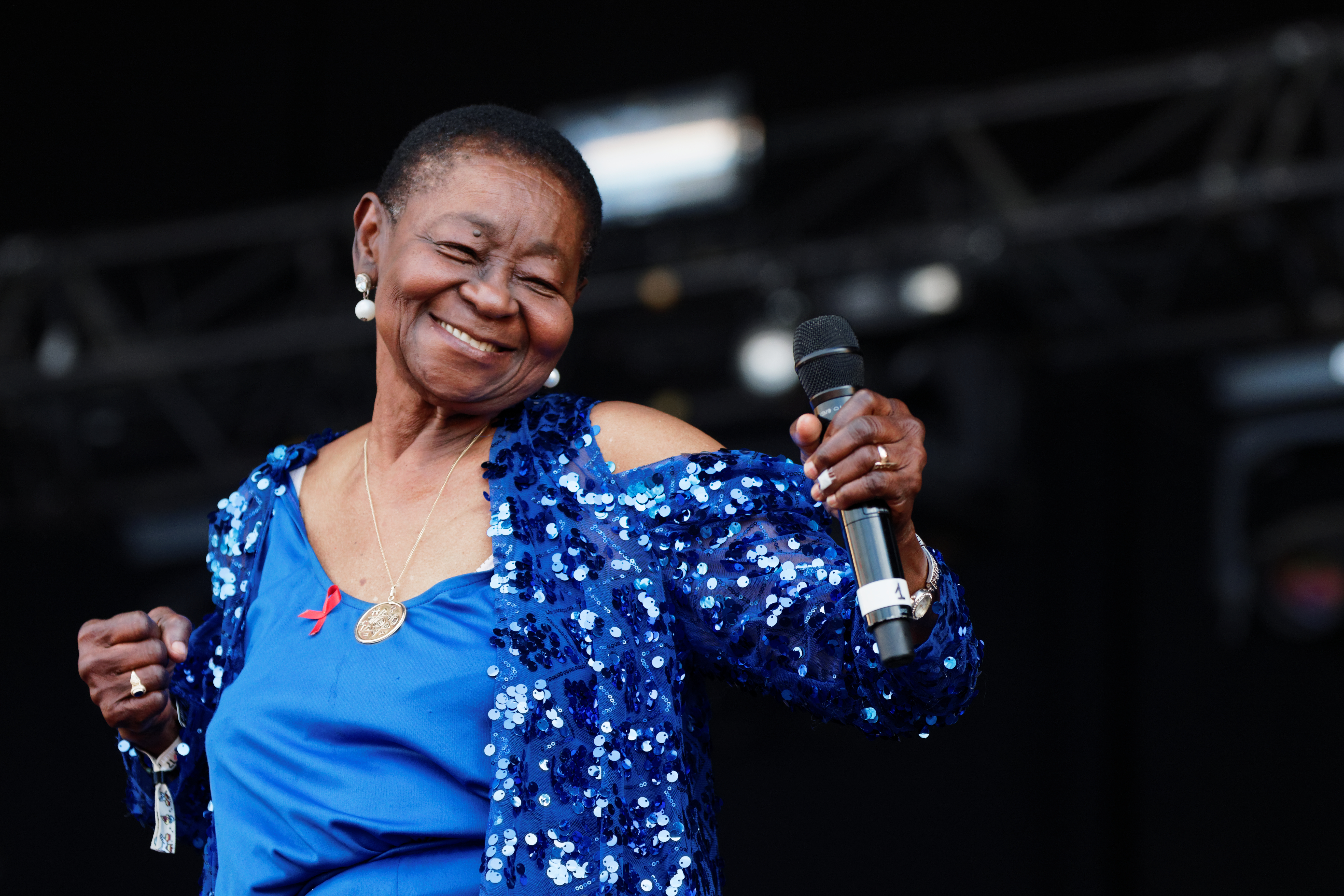 Calypso Rose en concert lors du festival des vieilles charrues 2016.